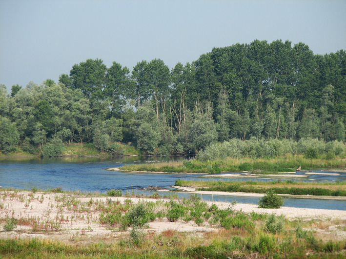 Il Ticino al Canarazzo, Carbonara al Ticino, Pavia, Italy